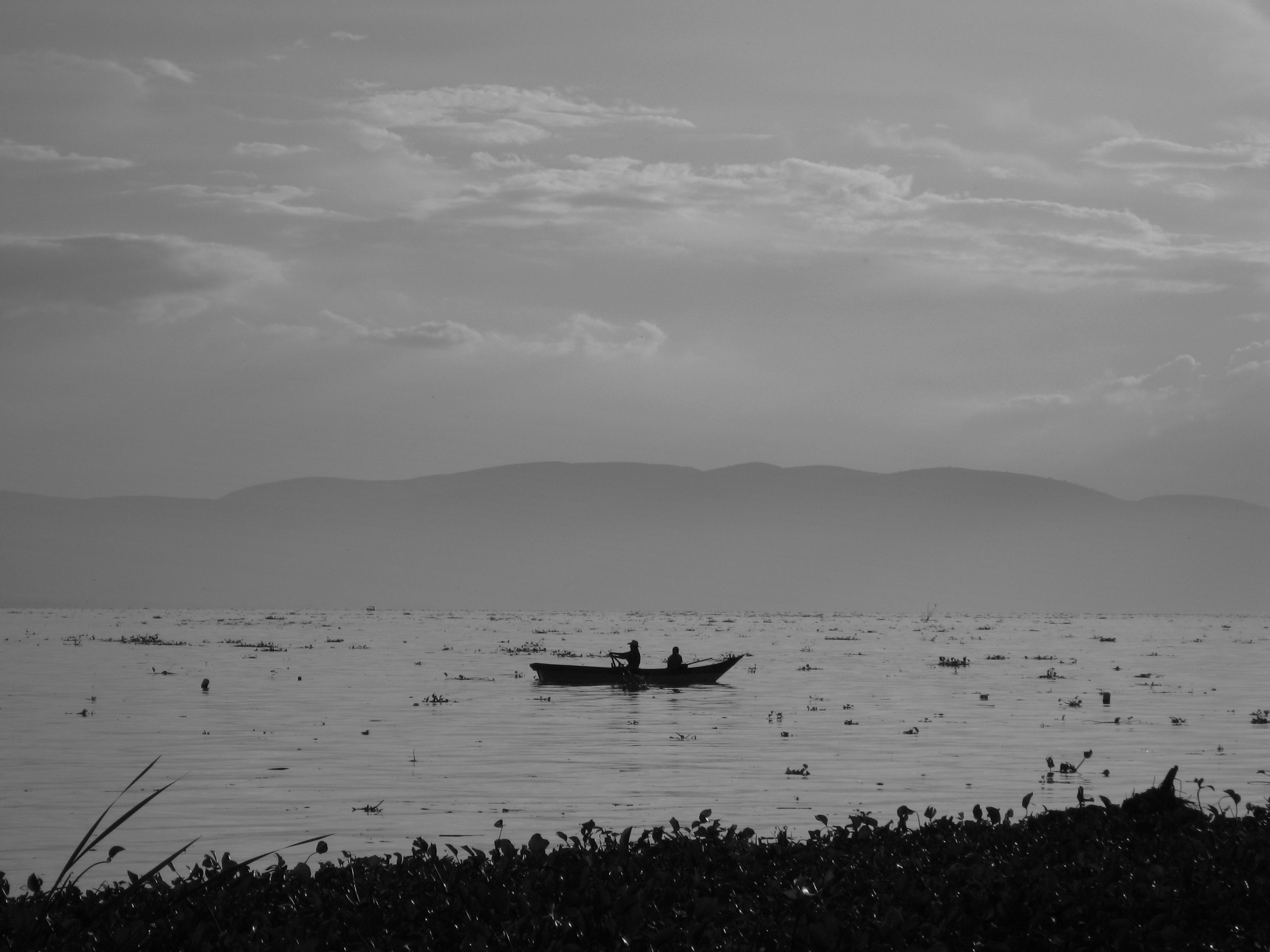 La original no dista mucho en cuanto a color, el cielo tiene un leve tono azul.